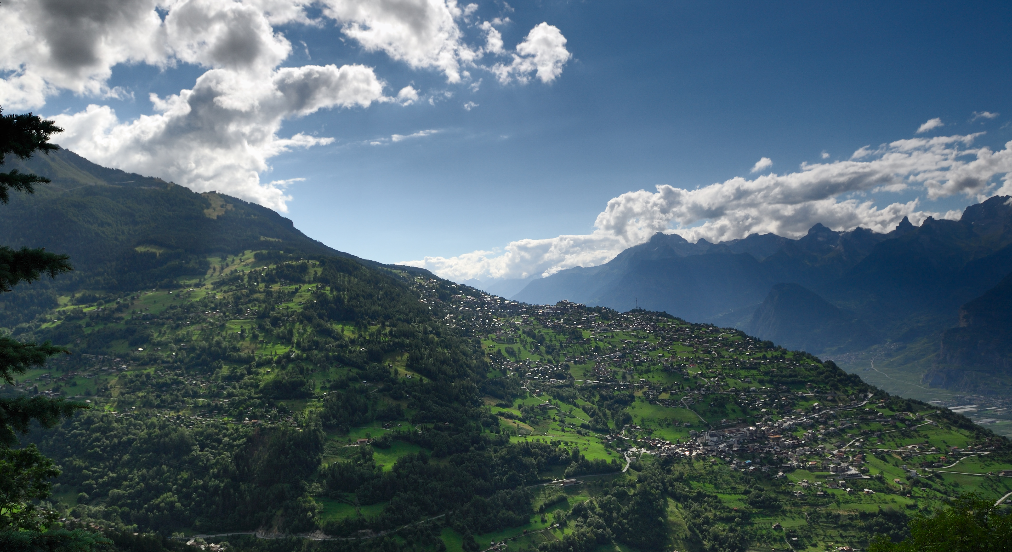 Auteur : Georges Hendrickx